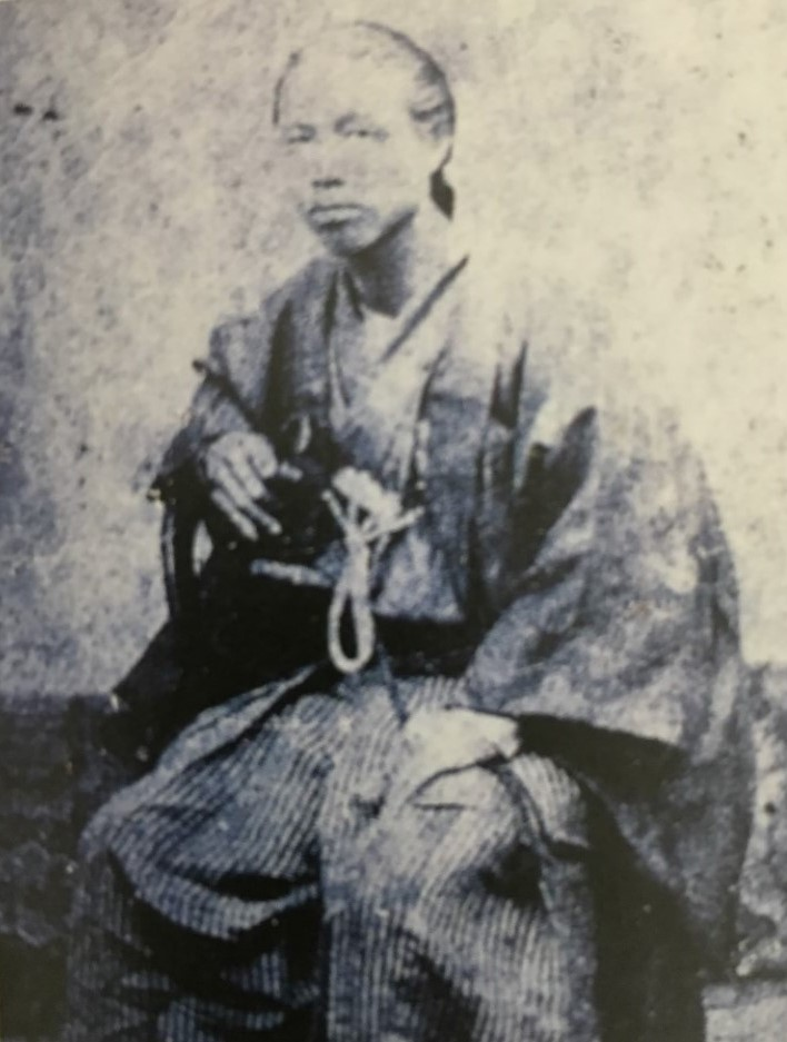 中島登の肖像写真。